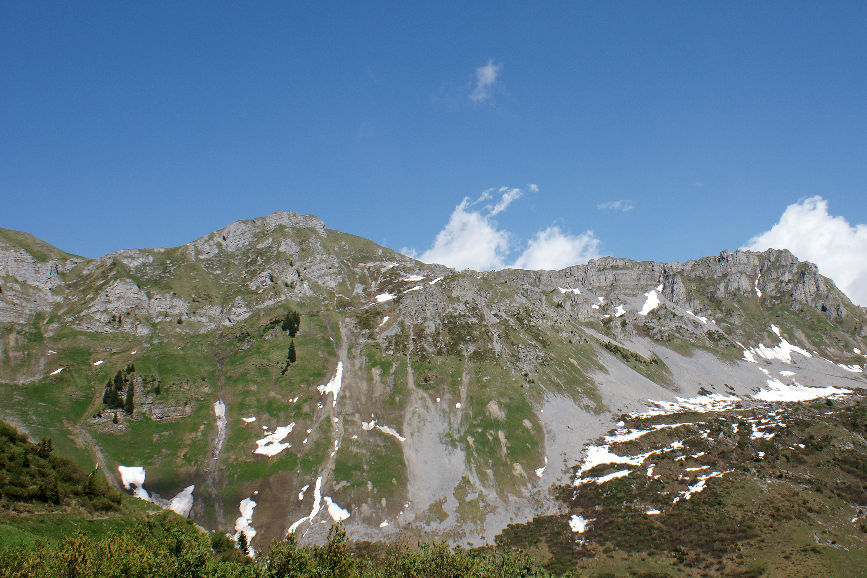 Chinzig Chulm, gesehen vom Weissenboden (Biel)